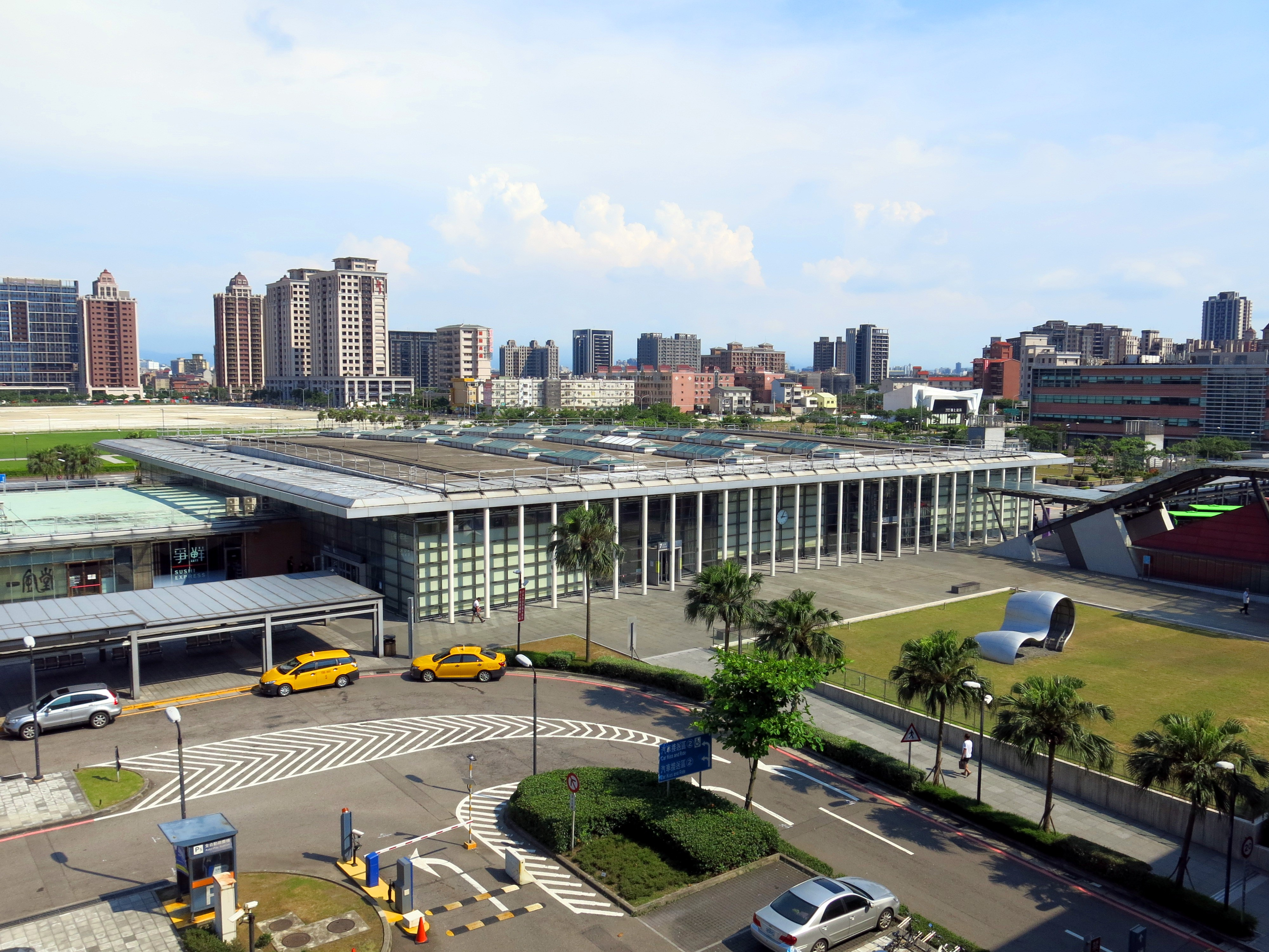 中文（台灣）: 台灣高鐵桃園車站